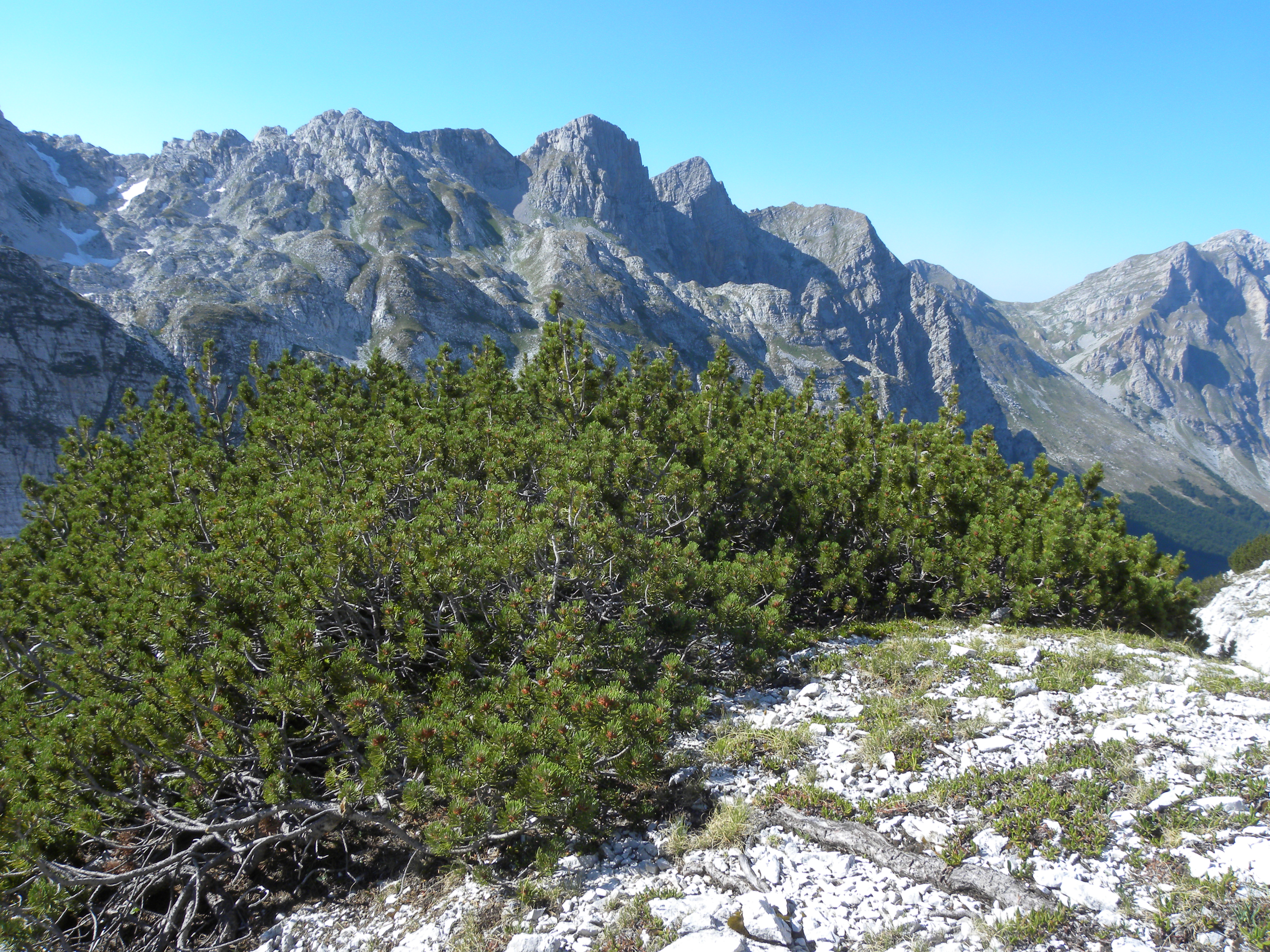 Diese in den Alpen verbreitete Art erreicht ihre lokale Südgrenze im Westen der Balkanhalbinsel in den feuchten Nordalbanischen Alpen (Foto: G. Pils)